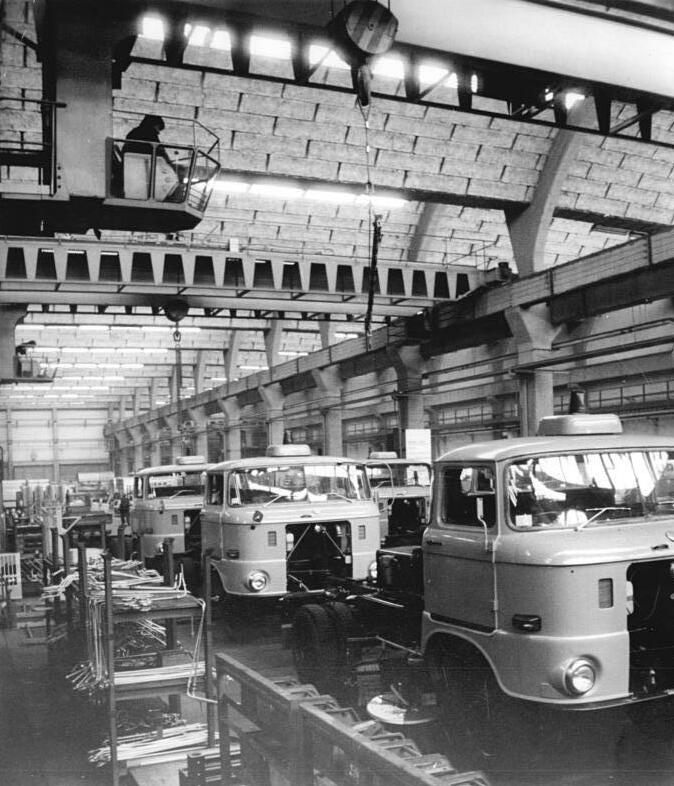 ADN-ZB-Zimmermann-20-9-78-Berlin: Am 28. Oktober werden vom Reißbrett bis zur Endmontage im VEB Spezialfahrzeugwerk Berlin alle Arbeitsplätze besetzt sein. Die 850 Belegschaftsmitglieder beschlossen als Antwort auf den Aufruf der Elektroköhler an diesem Tag eine Warenproduktion von insgesamt 200000 Mark zu realisieren. Blick in die Endmontage für Straßenkehrmaschinen.